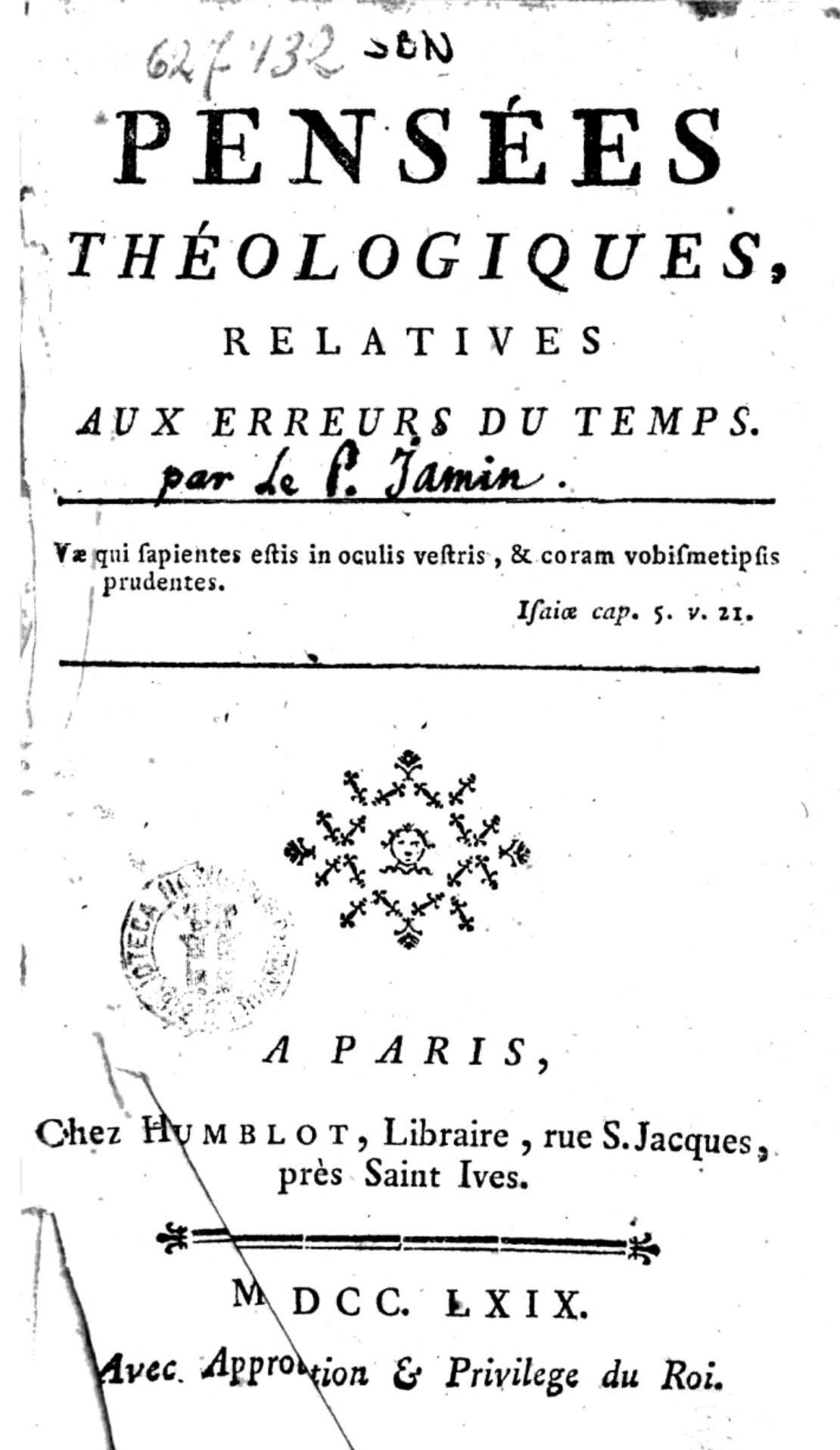 Nicolas Jamin OSB: Pensées théologiques, relatives aux erreurs du temps, Paris 1769, titre